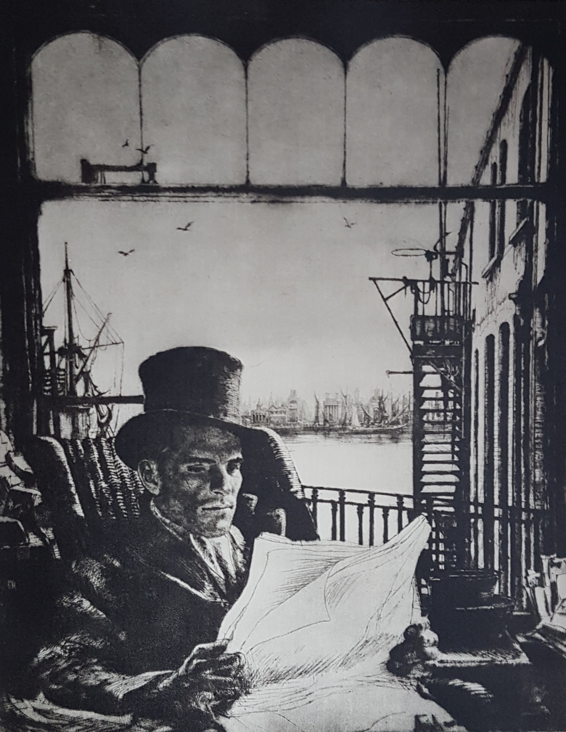 Tidningsläsaren (Mr Simmons) skapad av Axel Fridell, avfotograferad bild från Allhems Svenskt konstnärslexikon.